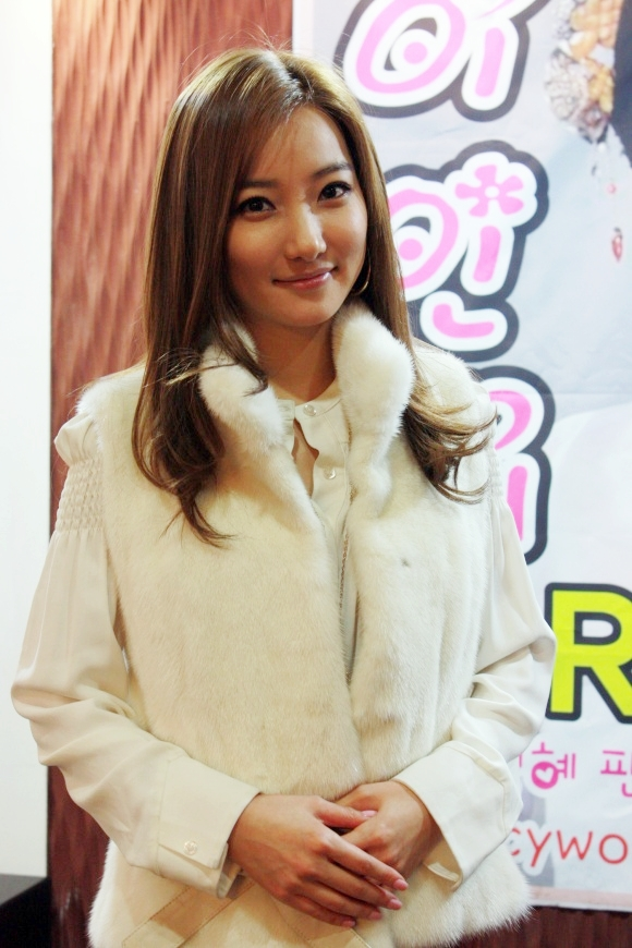 2011년 팬미팅에서 배우 이인혜